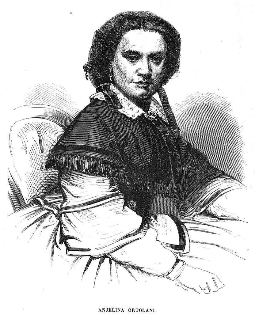 Angelina Ortolani, en la revista española El Museo Universal.